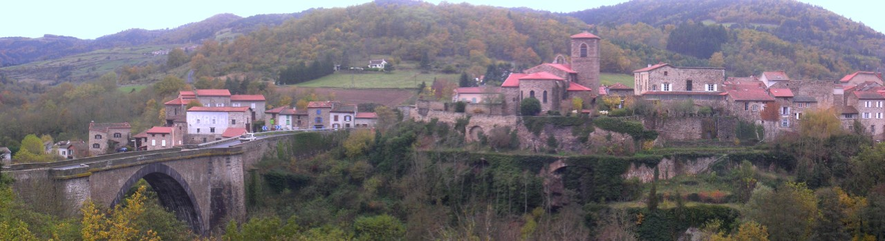 Panorama sur Vieille-Brioude et la vallée de l'Allier